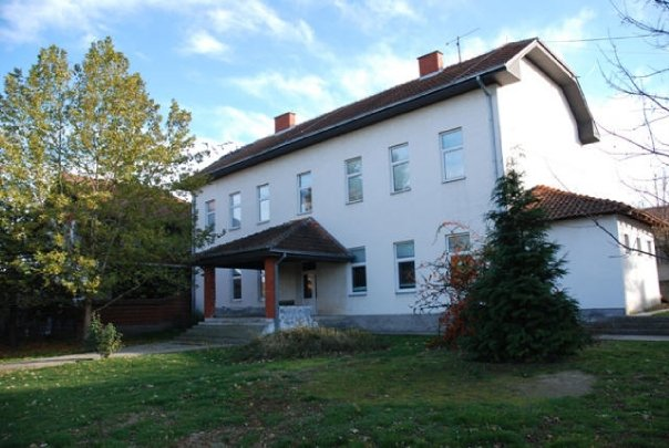 Škola u Toplovniku